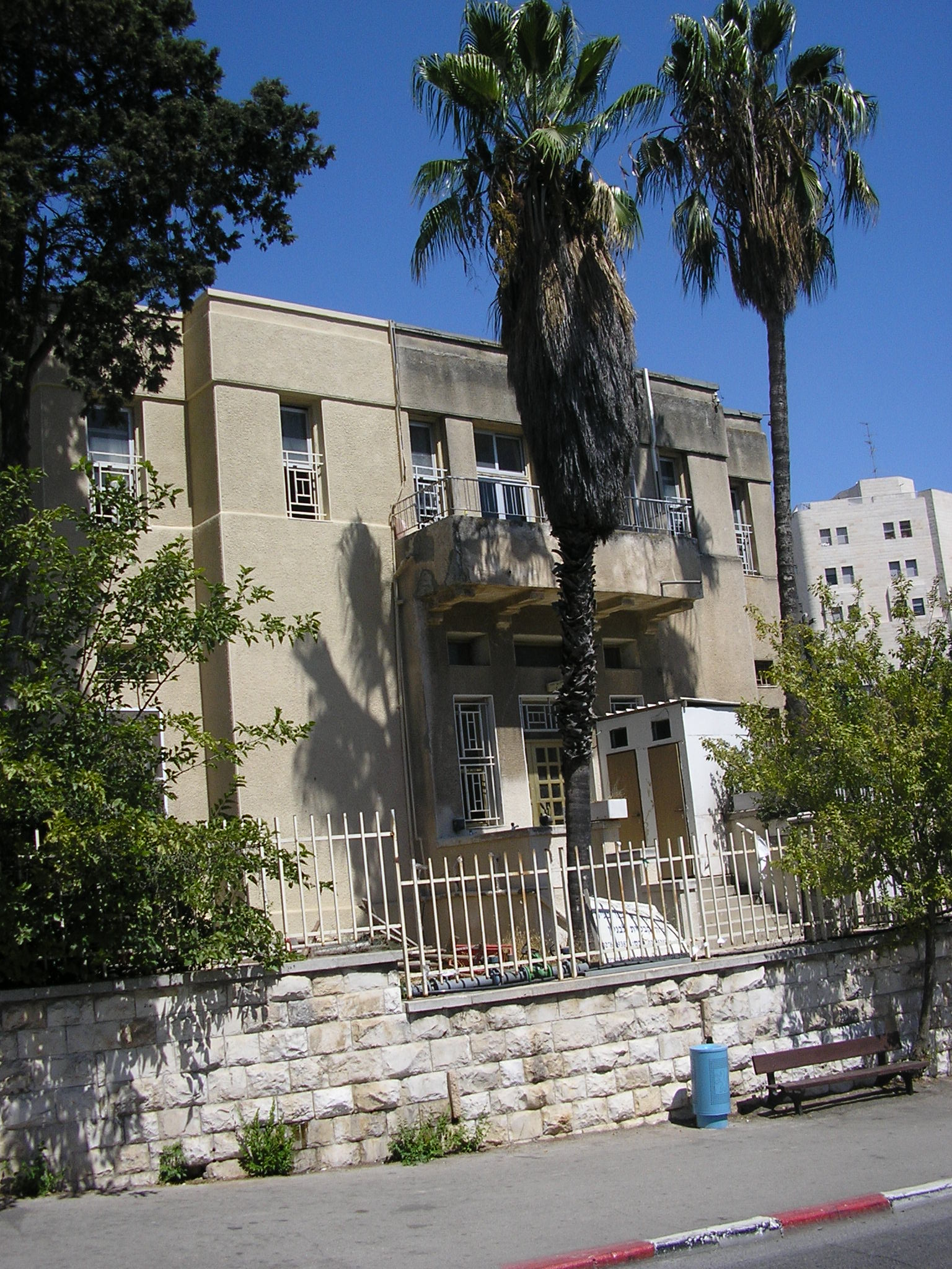 בית חינוך עיוורים, ירושלים.